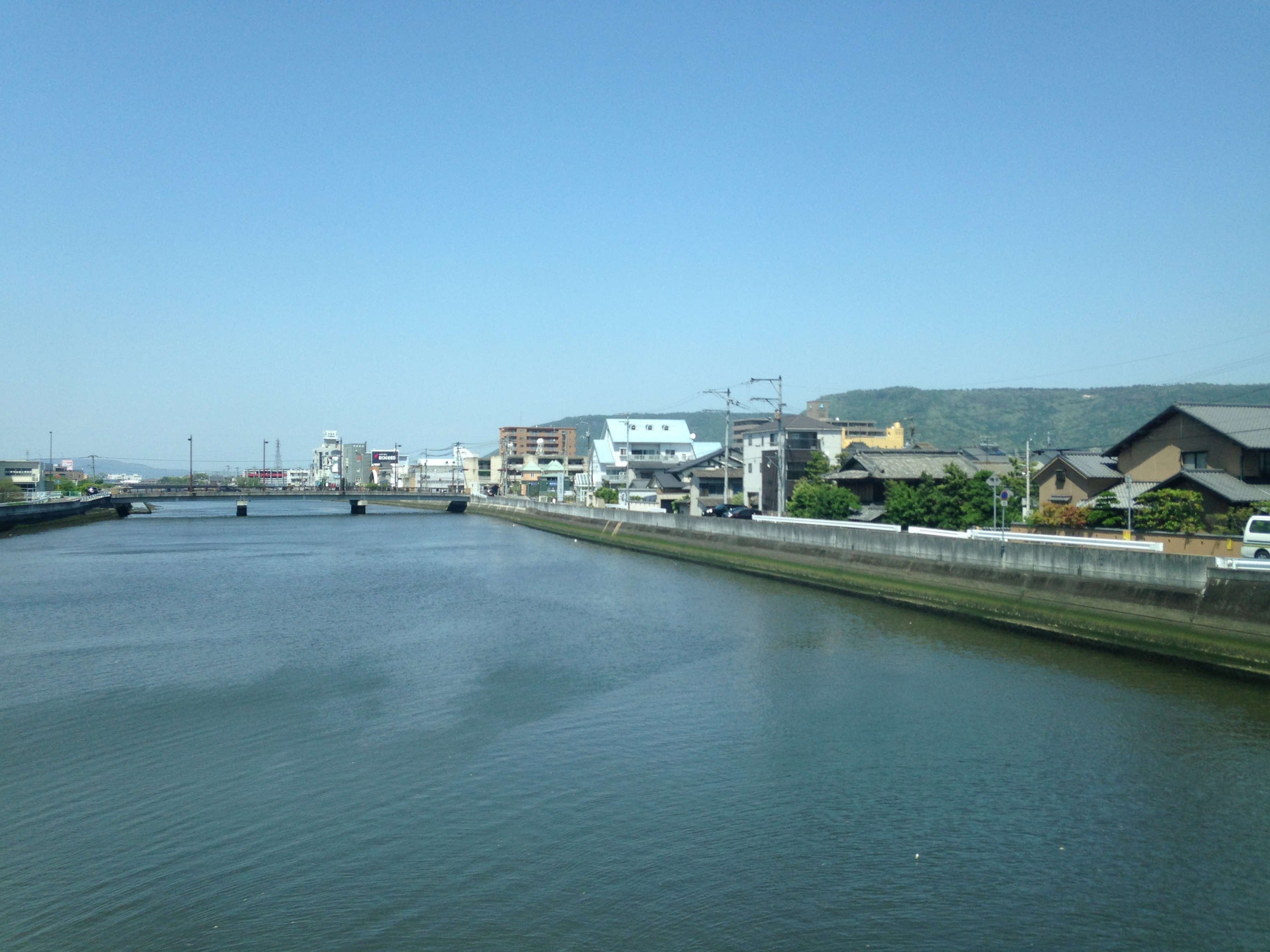 高徳線の列車内から望む詰田川(下流側)。右側は屋島